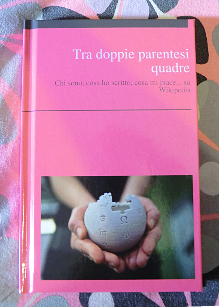 Immagini di un libro PediaPress creato da me nel giugno 2011 grazie al Progetto Wikilibri 2011. Cover: File:Wikipedia_mini_globe_handheld.jpg.